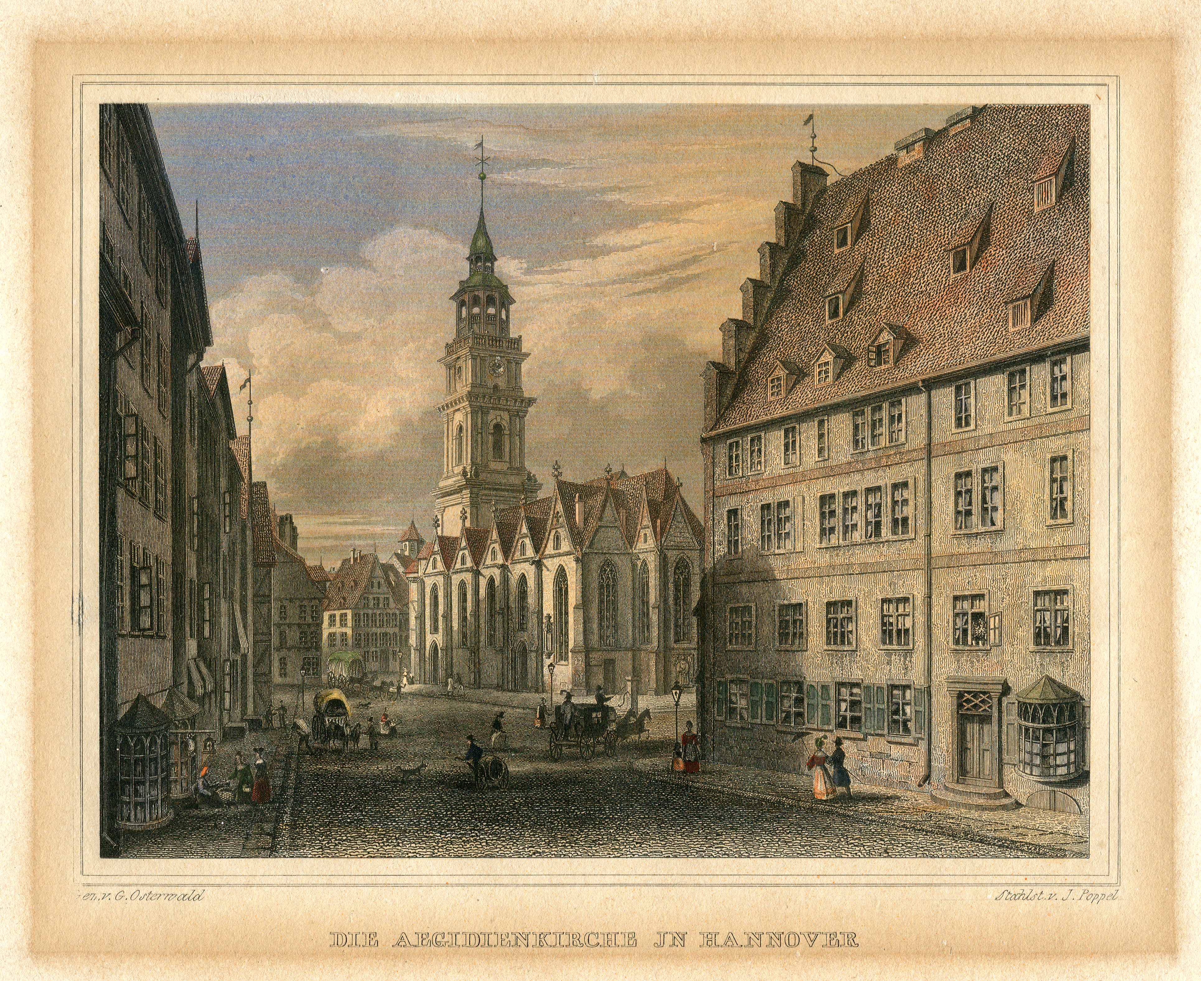 "Die Aegidienkirche in Hannover", Blick entlang der Alten Kanzlei" durch die Breite Straße; sogenannter "altkolorierter" Stahlstich von Johann Poppel nach einer Zeichnung von Osterwald, elektronischer Ausschnitt des Blattes ...